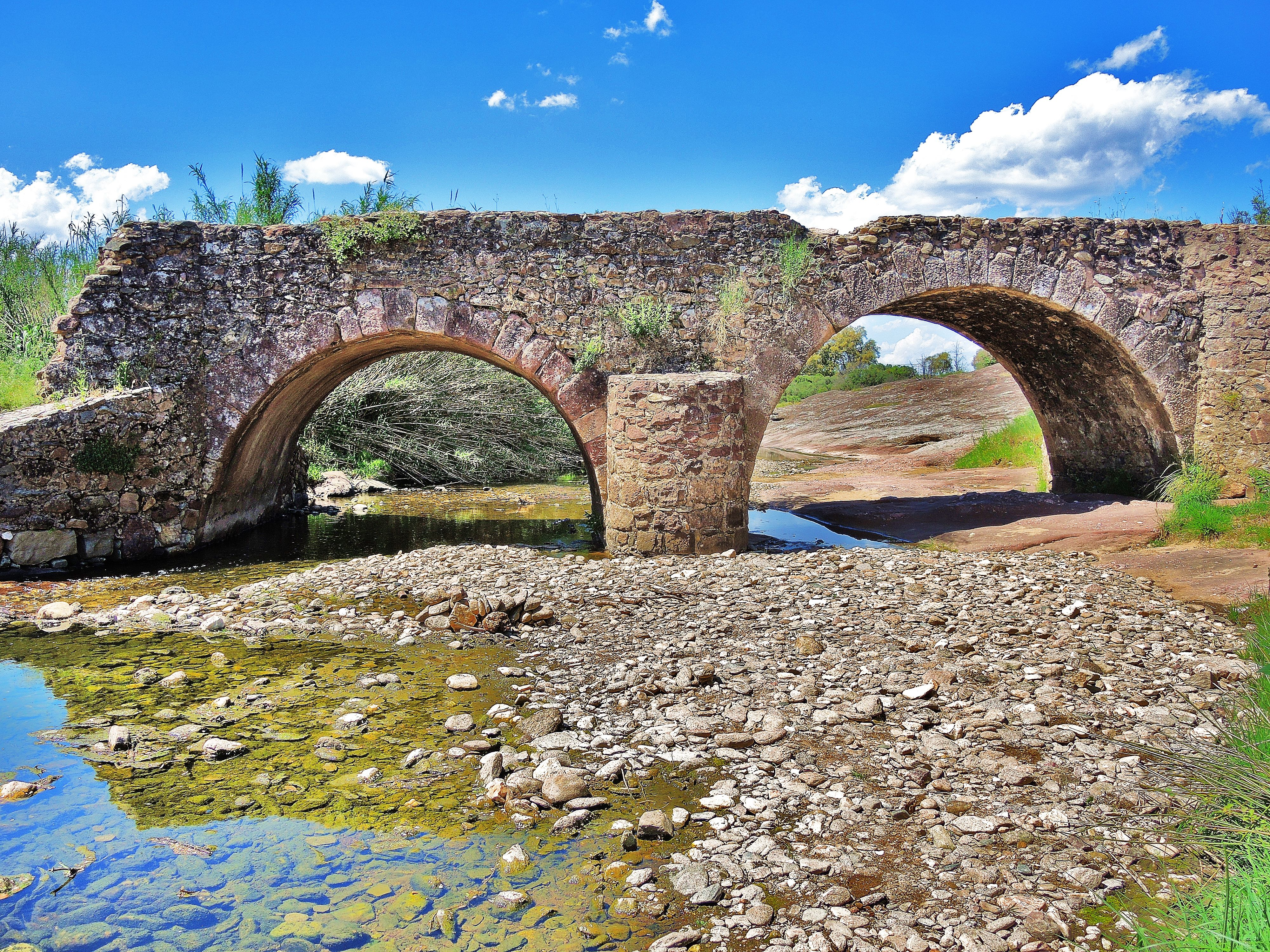 Ponr "romain" sur le ruisseau des Mourgues.